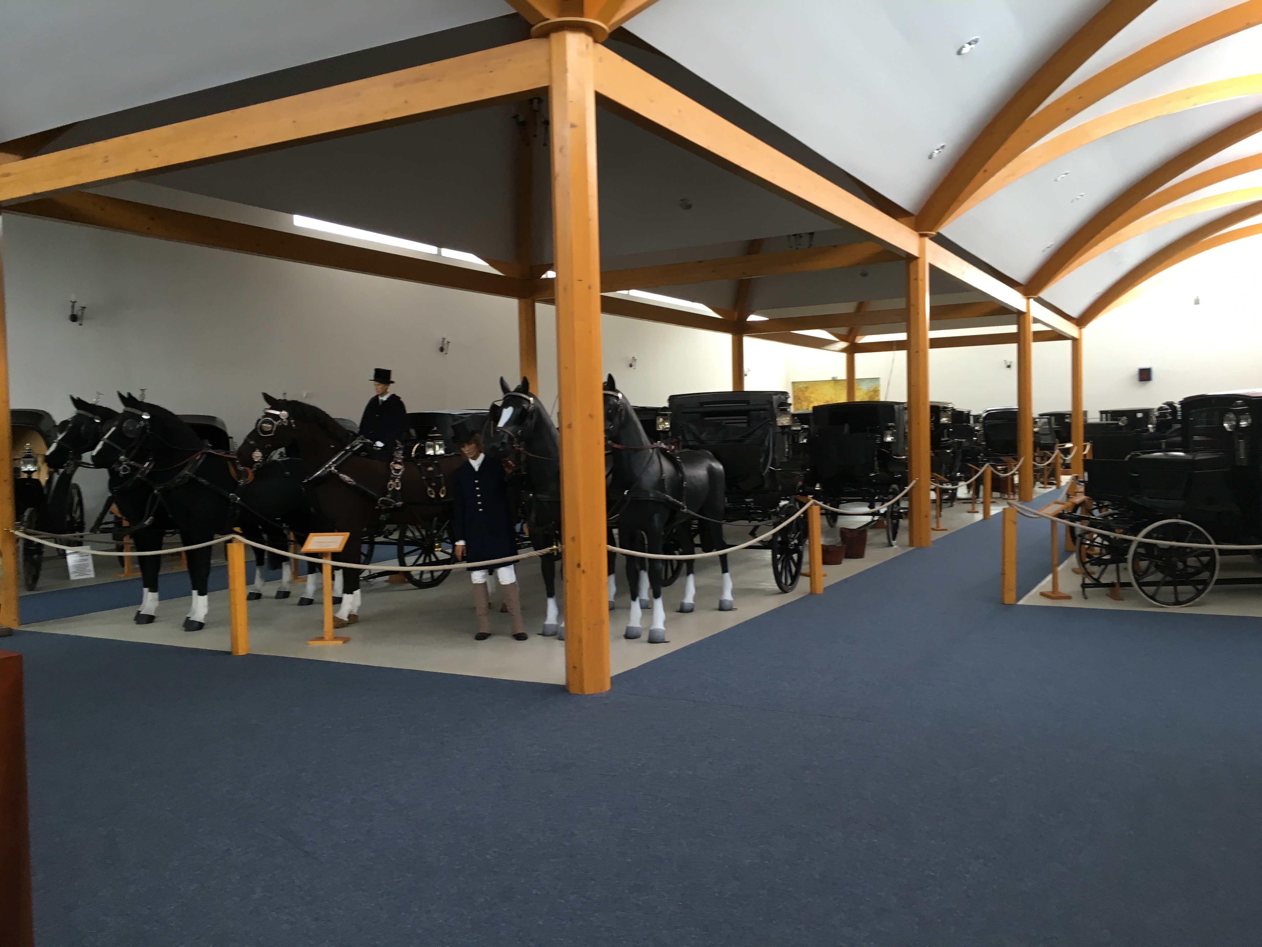 Mecklenburgisches Kutschenmuseum Kobrow